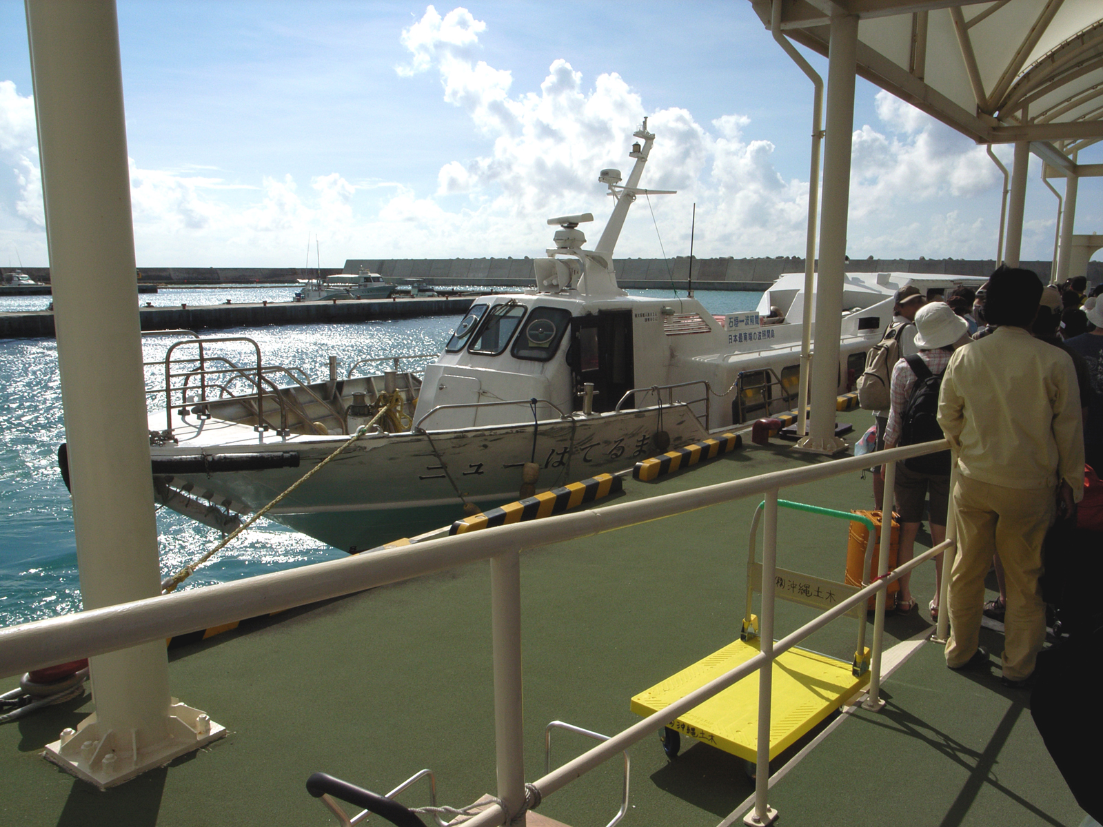 波照間港に停泊する波照間海運のニューはてるま（沖縄県八重山郡竹富町波照間島）